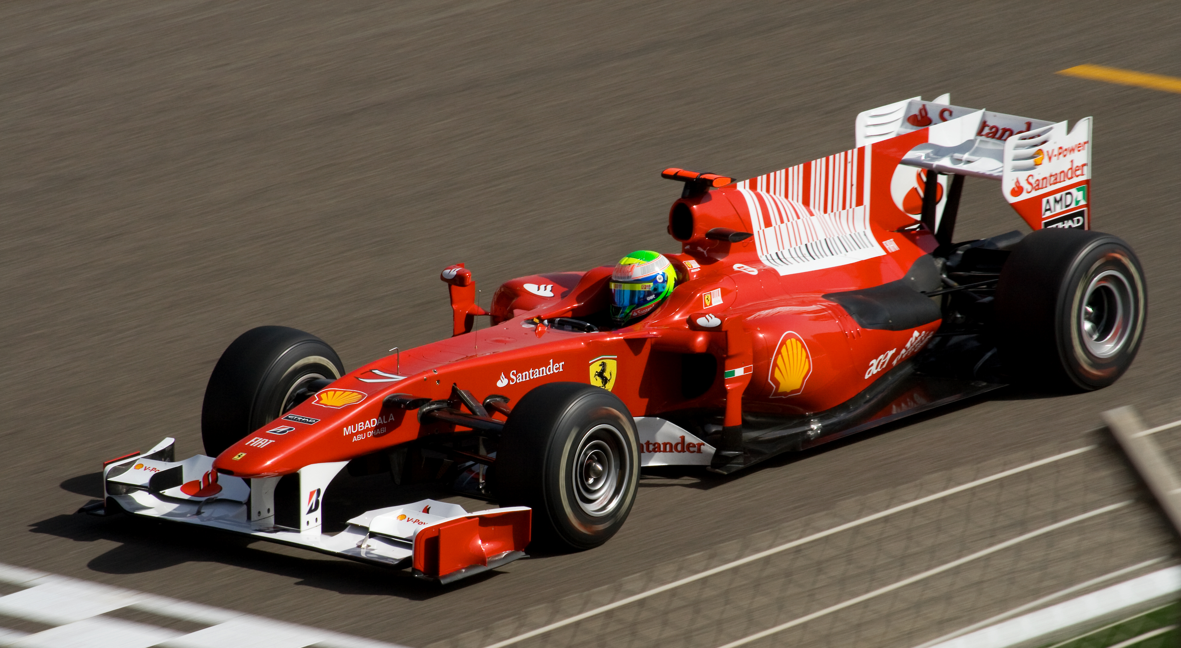 Felipe Massa Ferrari single-seater during Bahrain 2010 GP